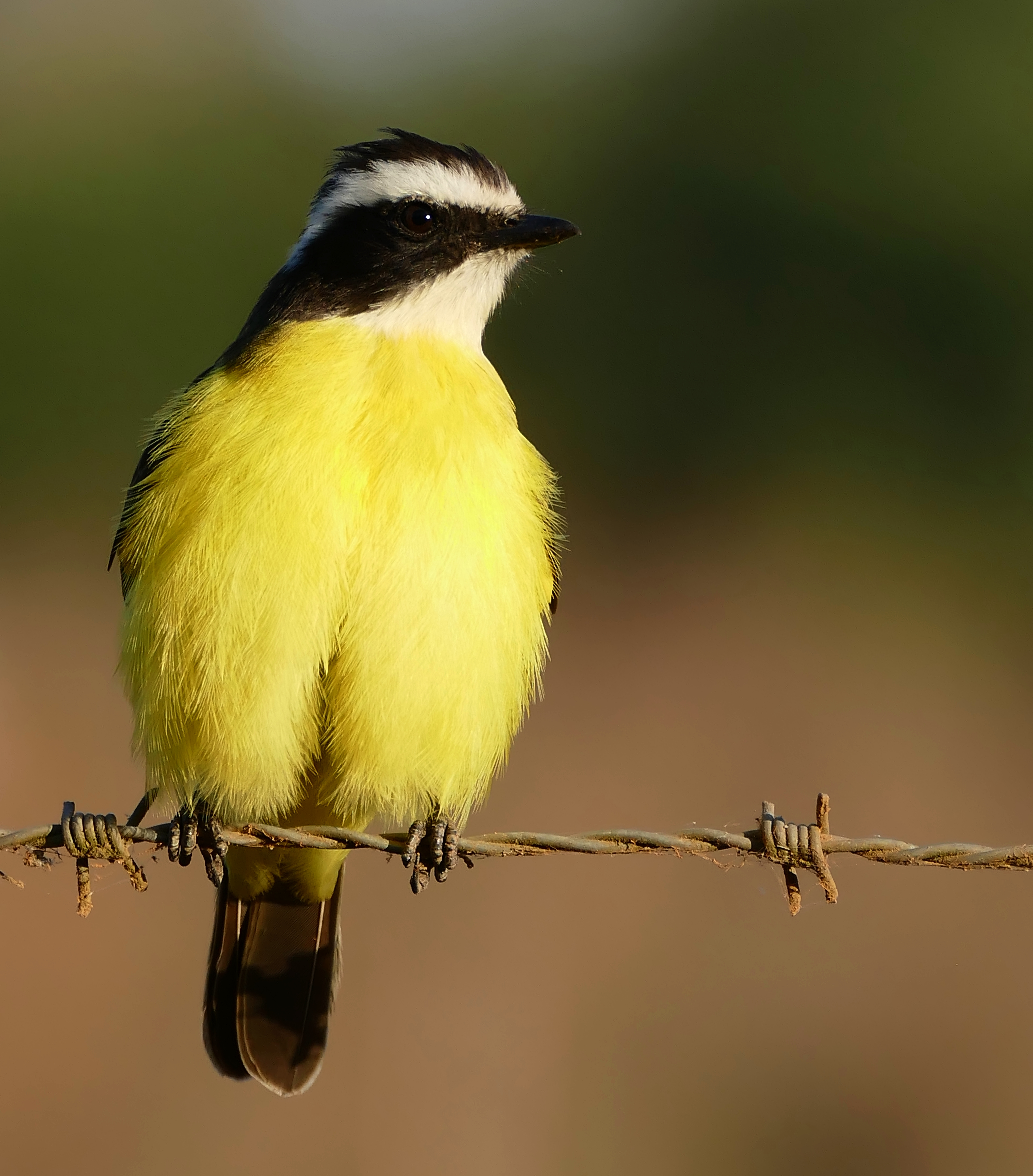 Transpantaneira, Poconé, Mato Grosso, BRAZIL